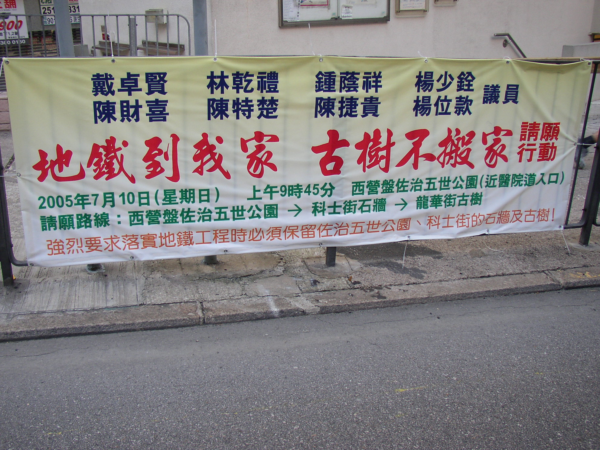 中文（香港）: 2005年7月31日Chungpui攝於香港島中西區般咸道及水街交界。